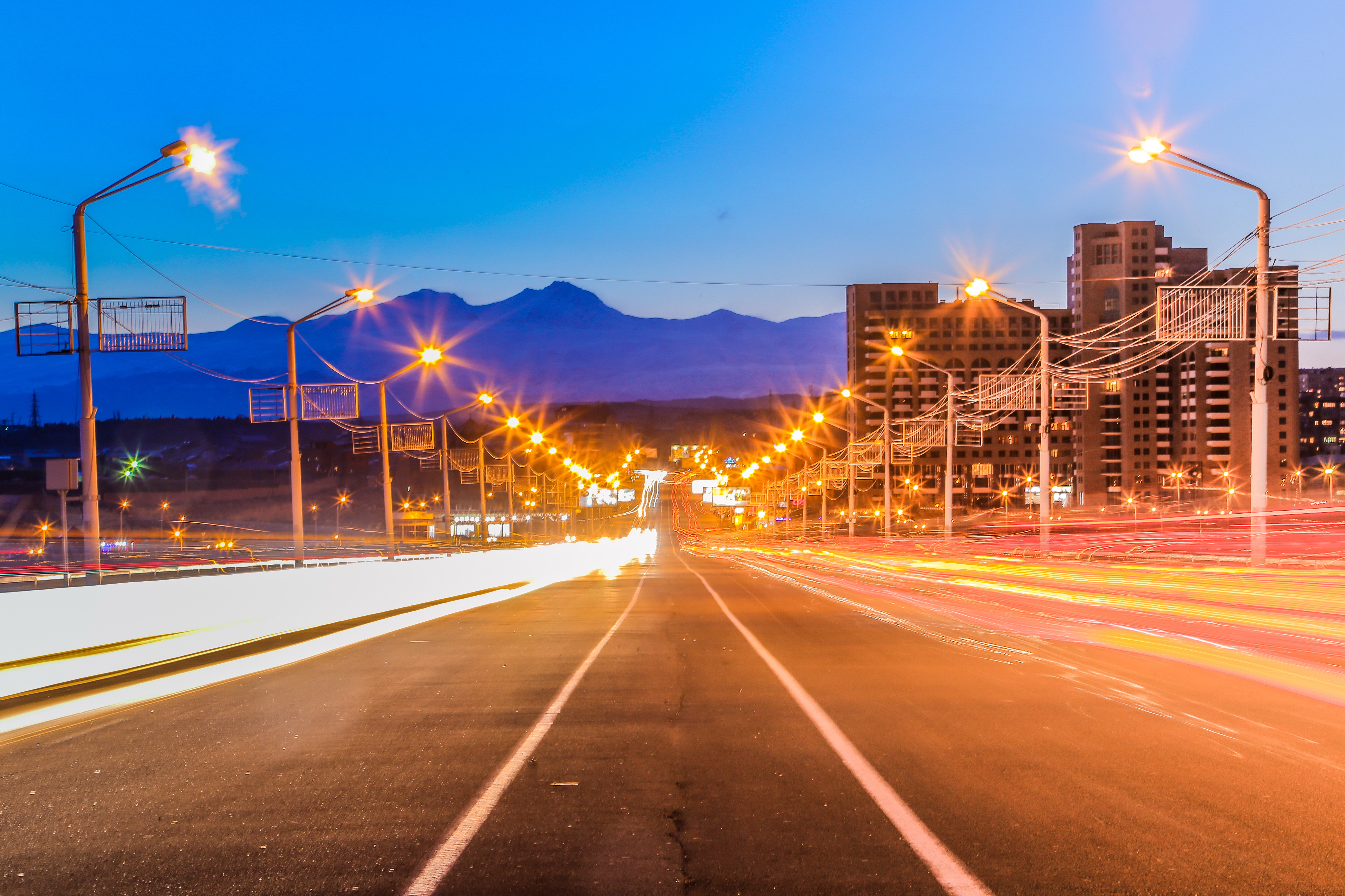 Դավթաշենի կամուրջ